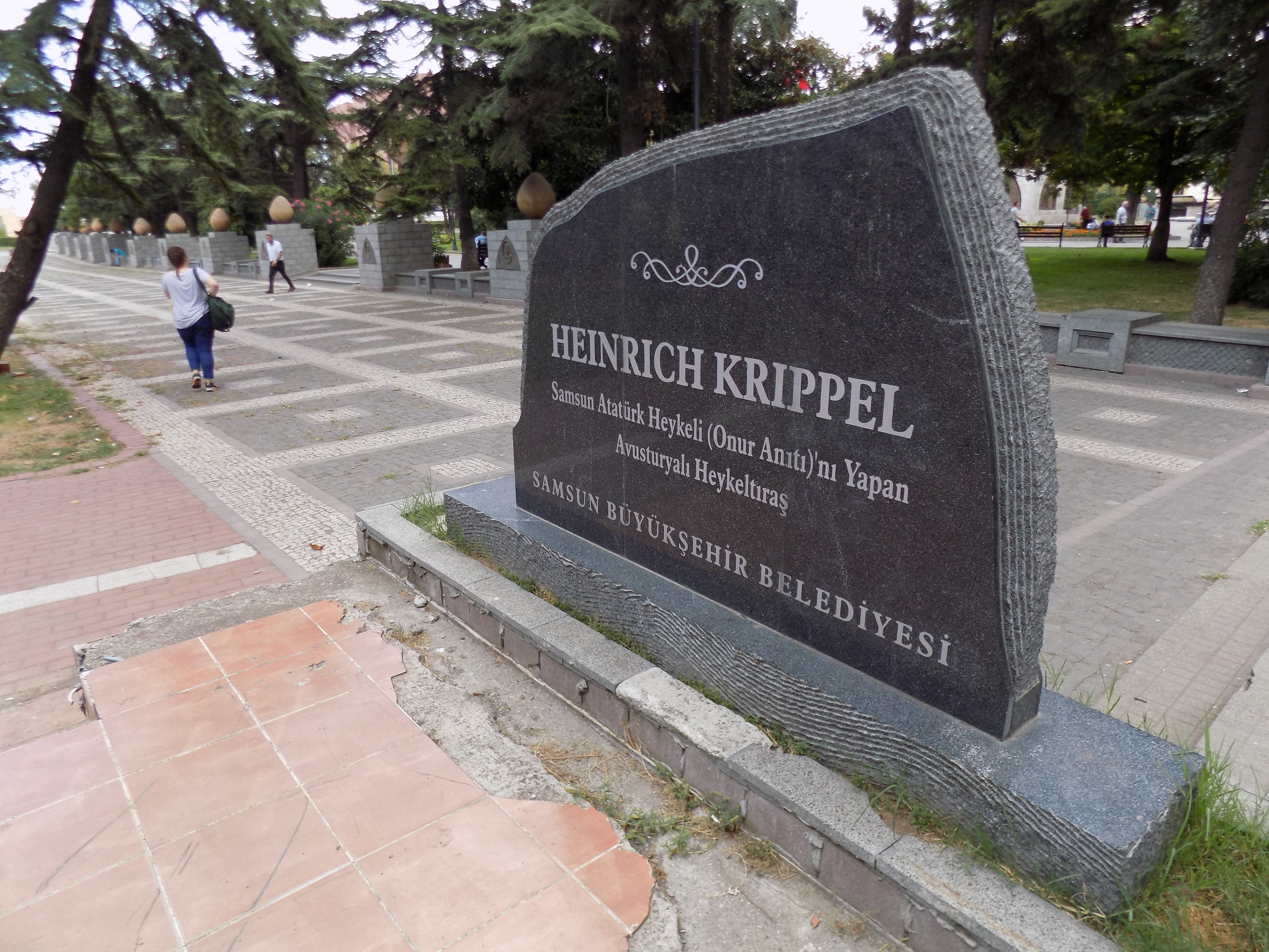 Onur Anıtı'nın bulunduğu Heinrich Krippel Caddesi'ndeki granit taş blok.